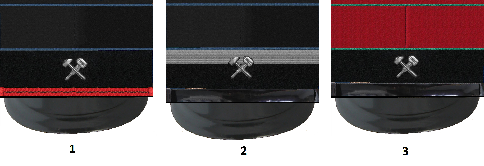 Фуражки МПС56